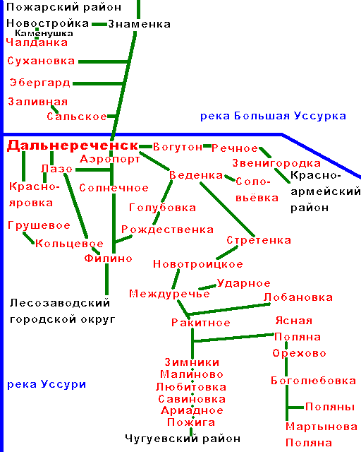 Схема Дальнереченск и окрестности